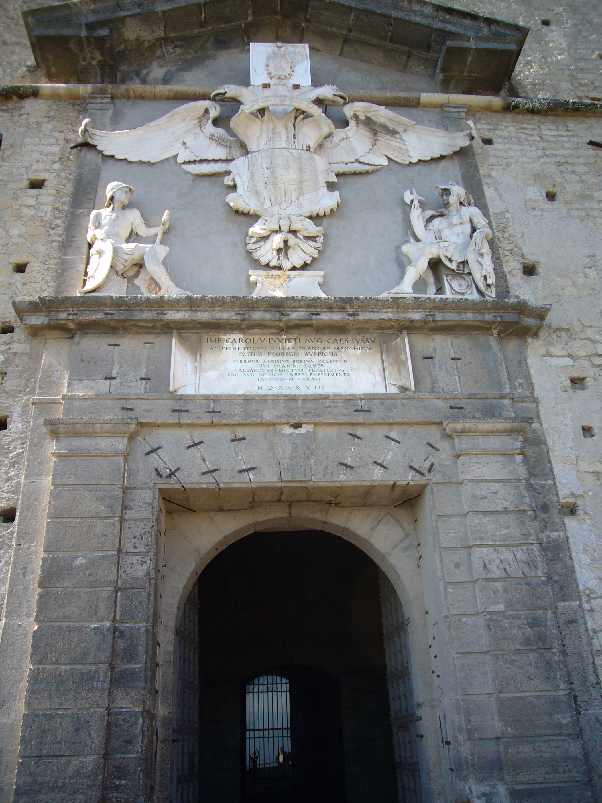 Napoli, Castel Sant'Elmo: Portale di Carlo V